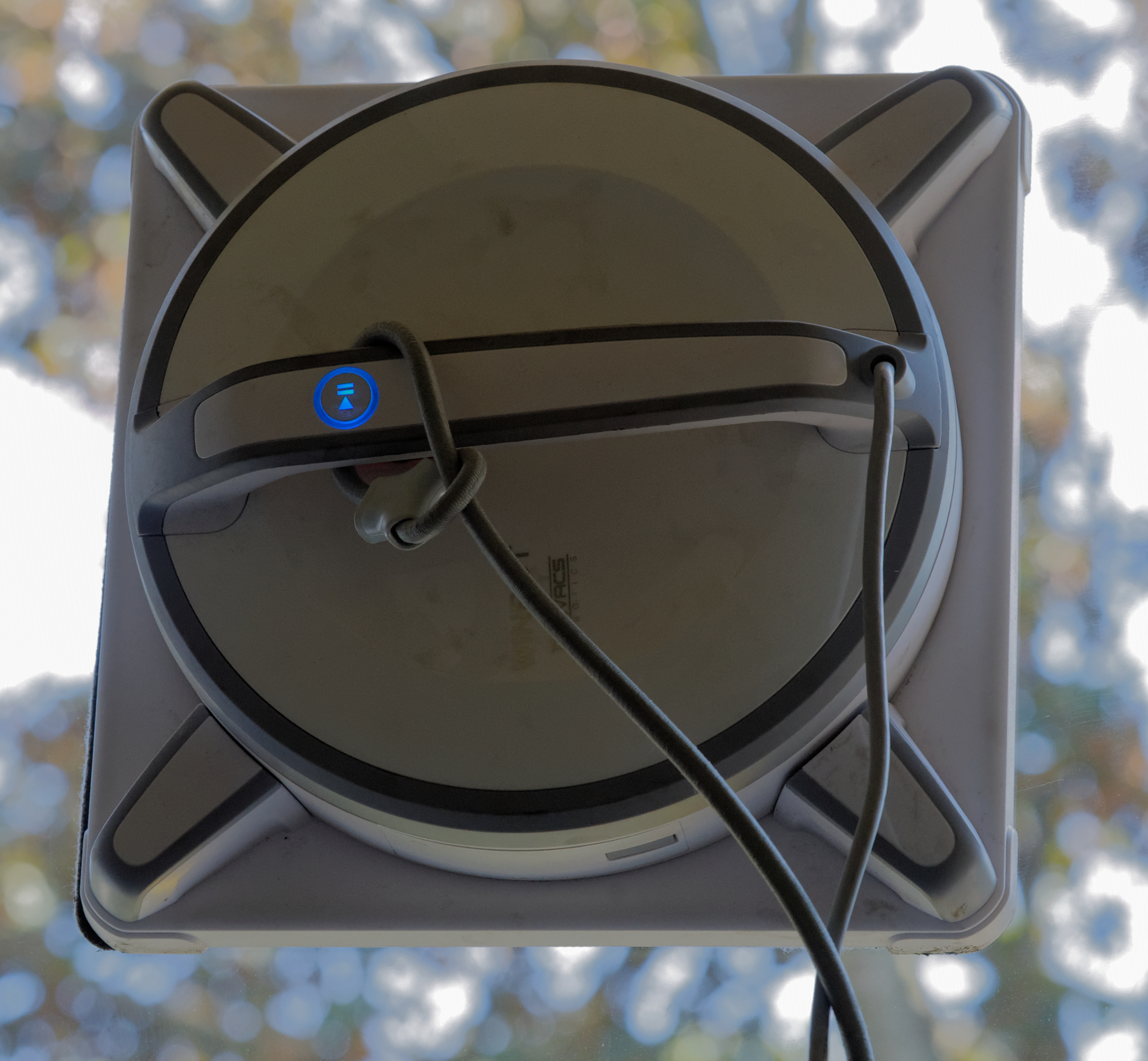 Fensterputzroboter